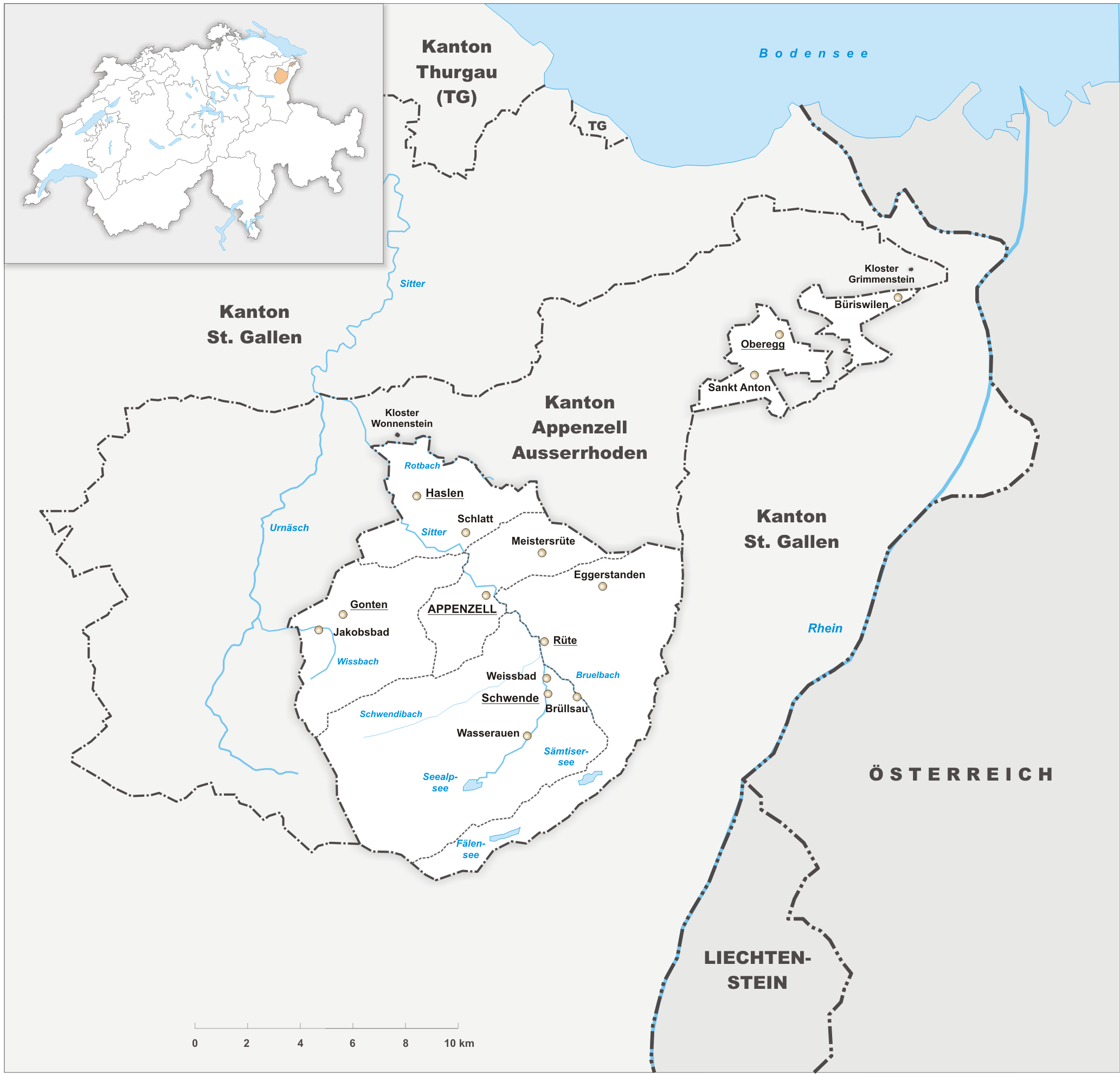 Karte des Kanton Appenzell Innerrhoden.